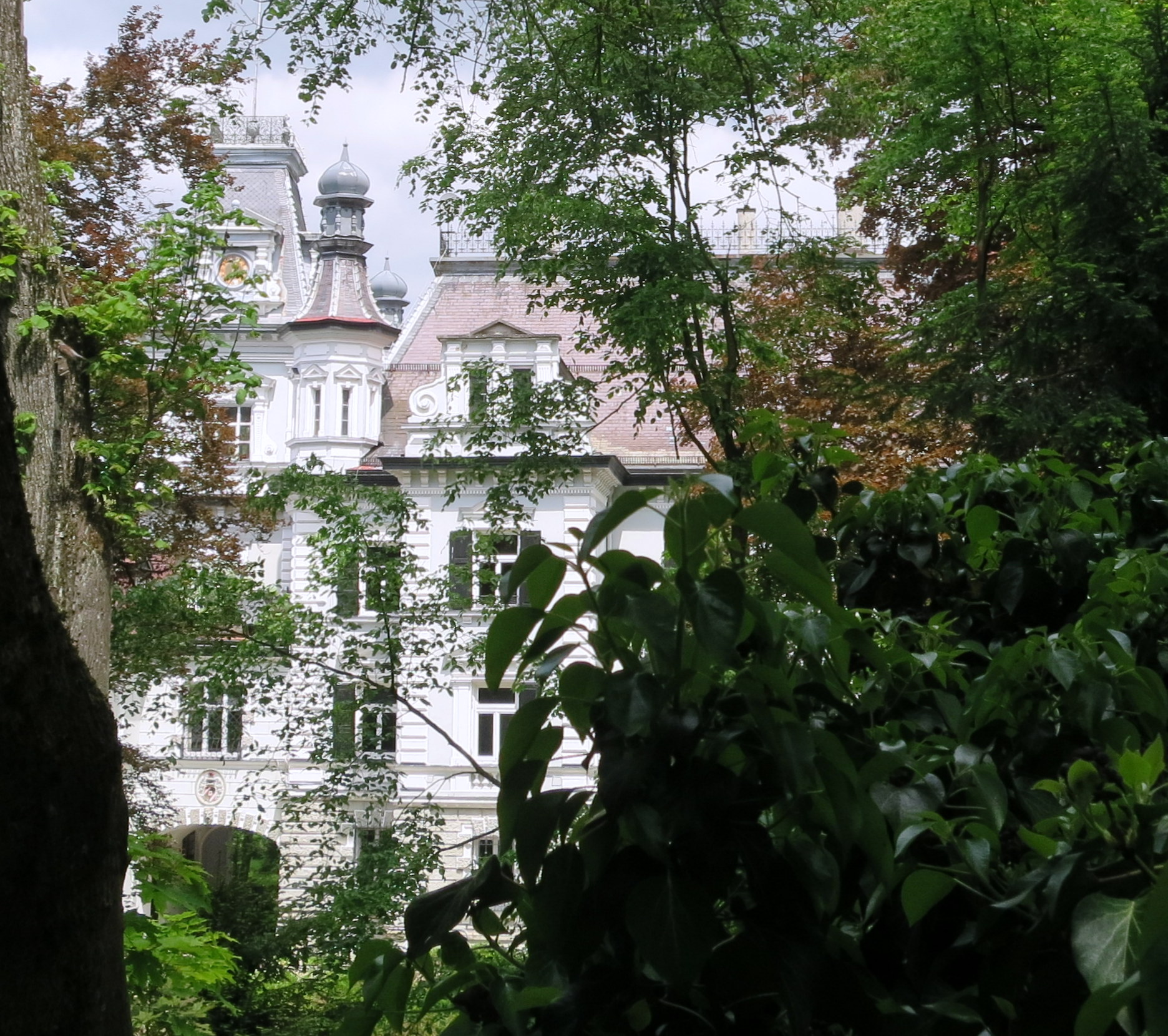 Das durch Bäume verborgene Schloss Au in der Hallertau